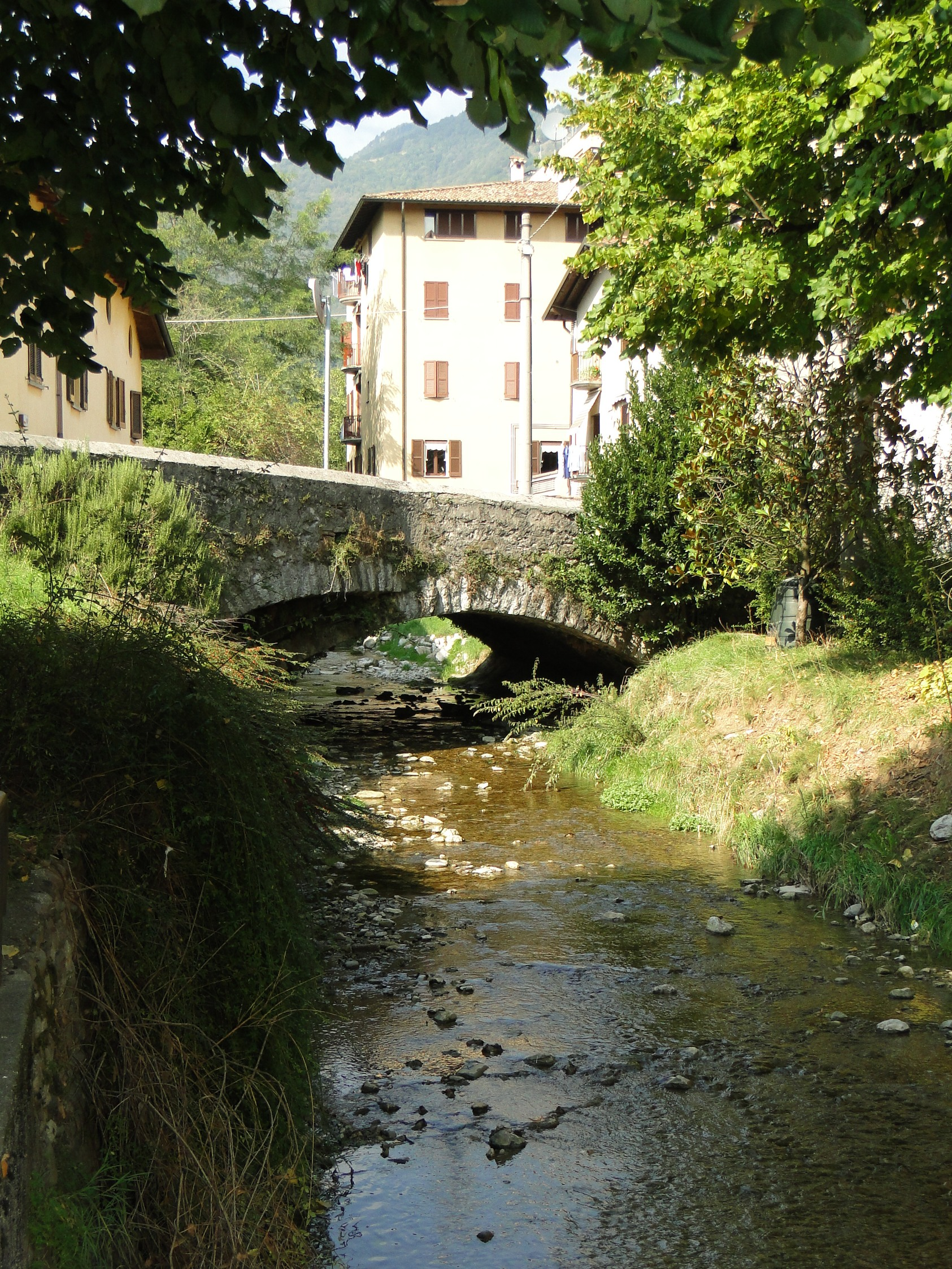 Ponte sul torrente Carso, Nembro (BG)